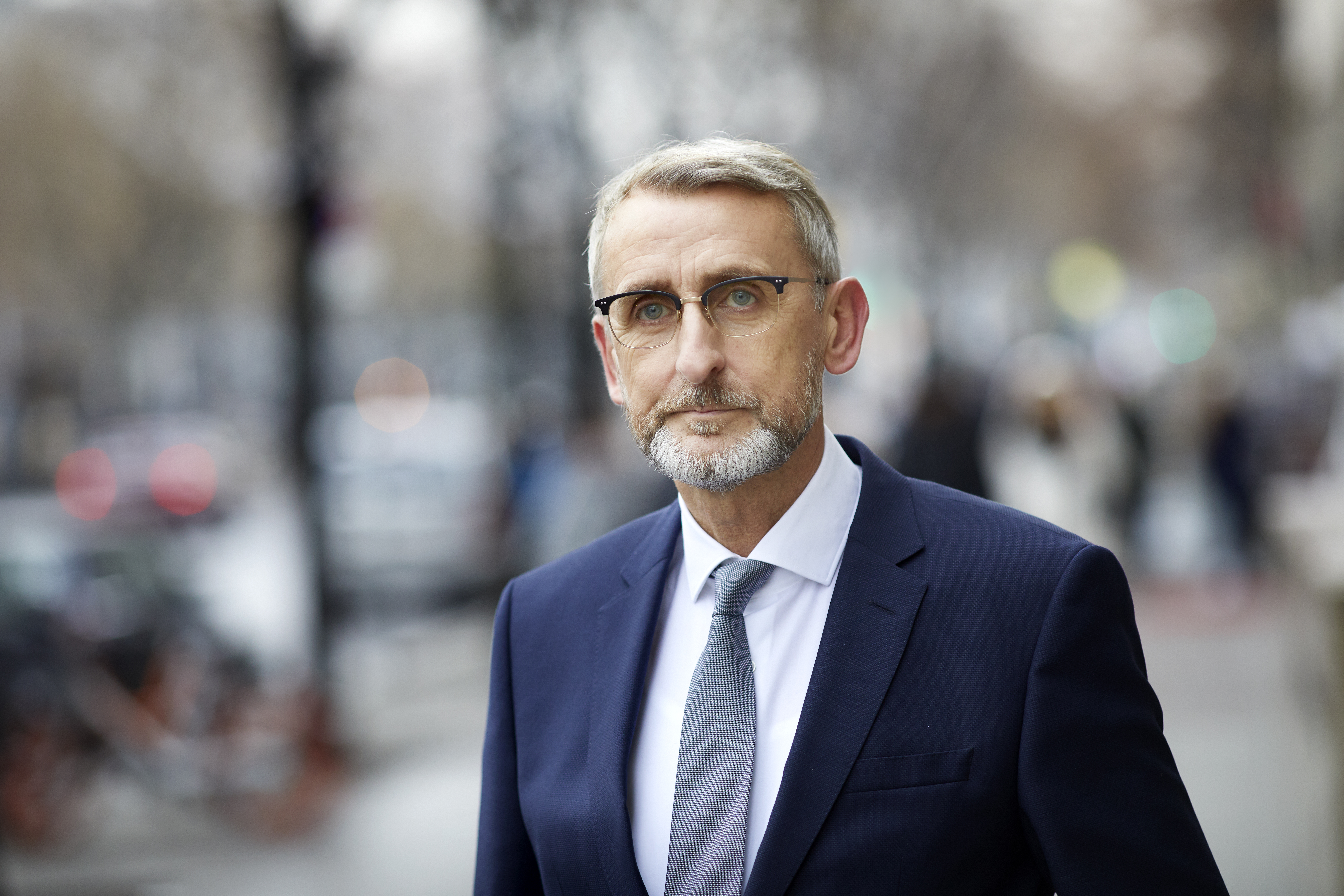 Armin Schuster im Berliner Regierungsviertel